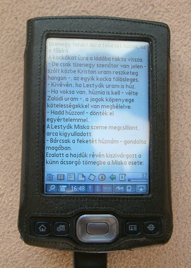 E-könyv Palm Tx eszközön, eReader szoftveren (Részlet Mikszáth Kálmán A beszélő köntös című művéből)